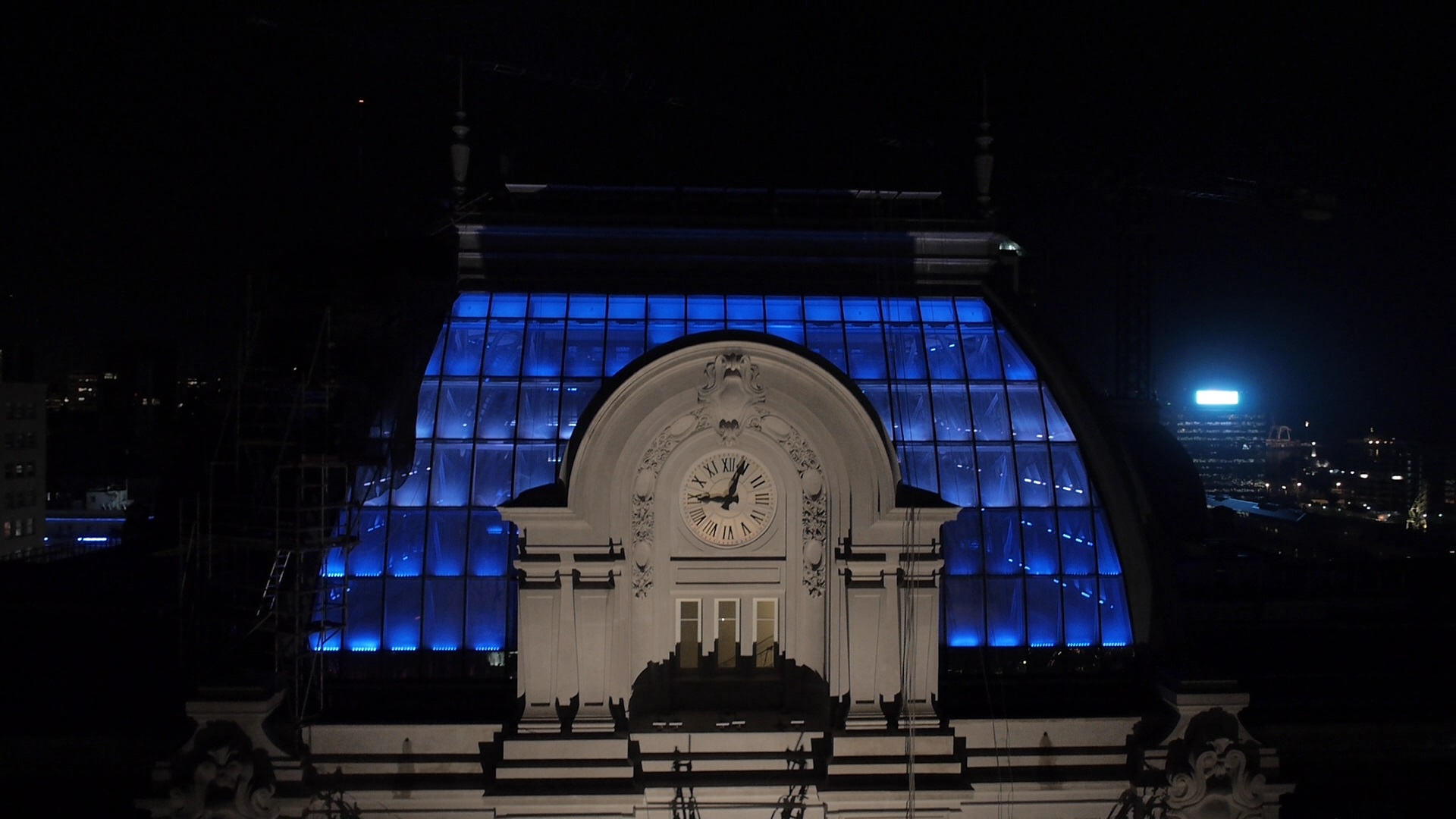 Cúpula del Correo Central, con las modificaciones hechas para la inauguración del Centro Cultural del Bicentenario.